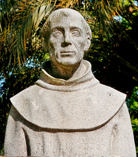 Busto de fray Juan Pérez, entorno de La Rábida. Palos de la Frontera (Huelva-Spain)